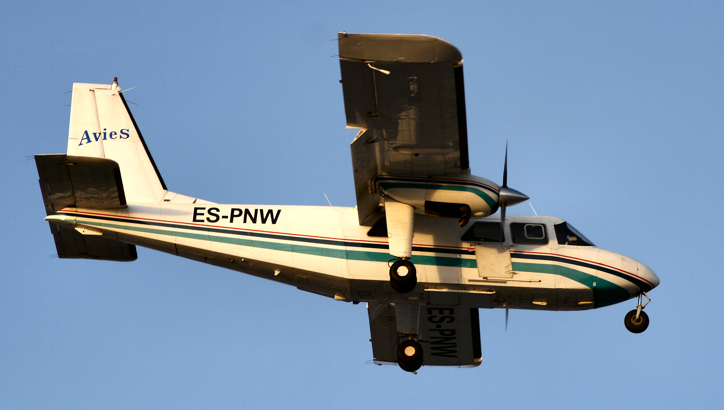 Aviesi Britten-Norman BN-2T Islander (ES-PNW) Pärnus maandumas. Autor Paavo Pihelgas, 2008-12-29. Kasutamine ainult viitega autorile.